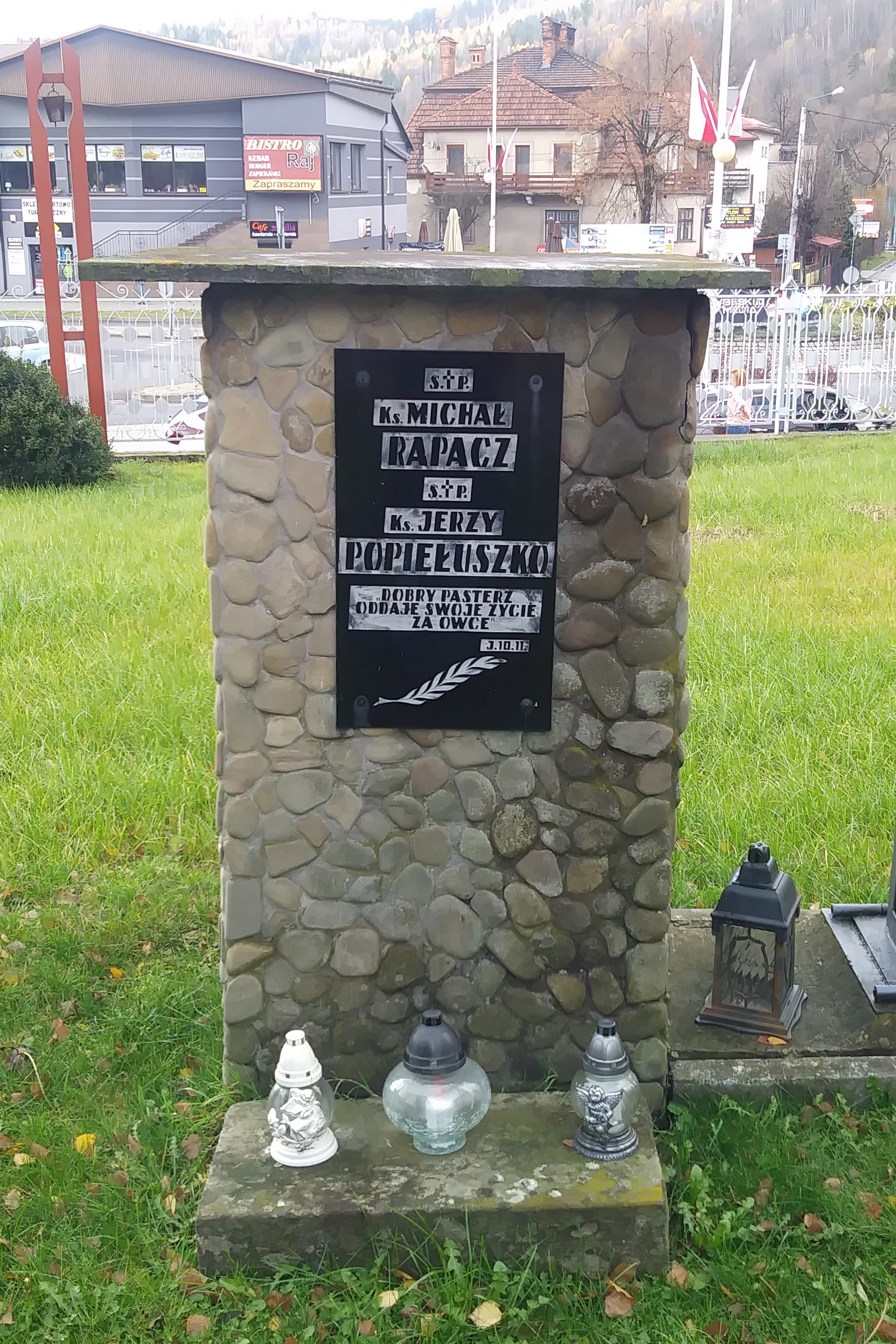 pomnik pamięci ks. Michała Rapacza i ks. Jerzego Popiełuszki w Rajczy przed kościołem parafialnym w Rajczy, w tle rynek w Rajczy